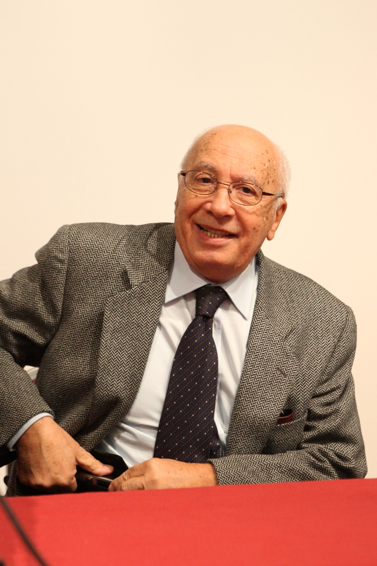 Orazio Cancila nel 2014